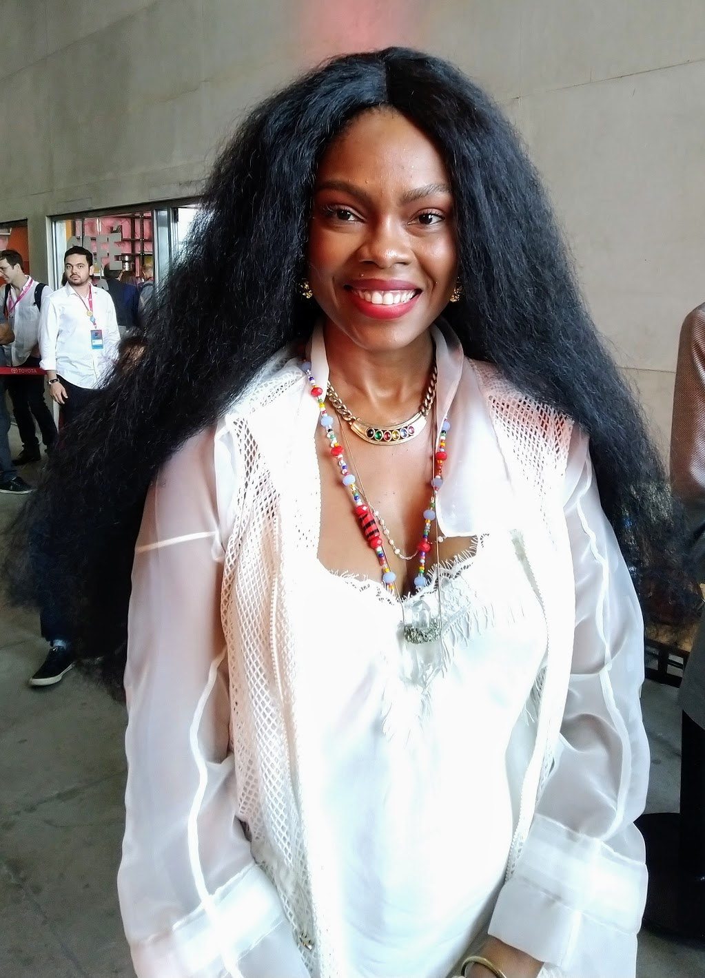 Xênia França durante o Rio2C 2019